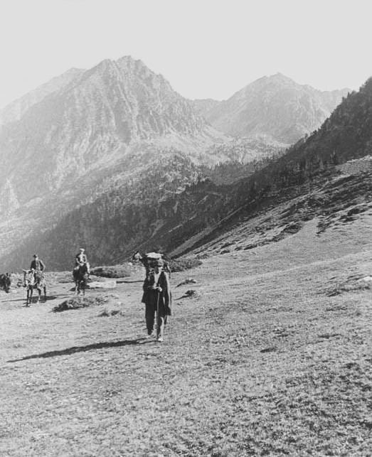 Imatge